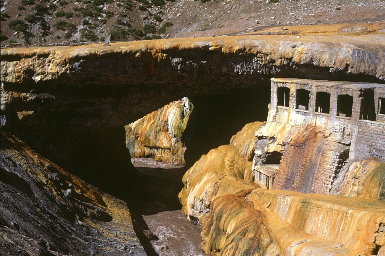 Puente del Inca - Argentinien/Argentina, Paso de Uspallata, ca. 2700 m s.m. (Prov. Mendoza)